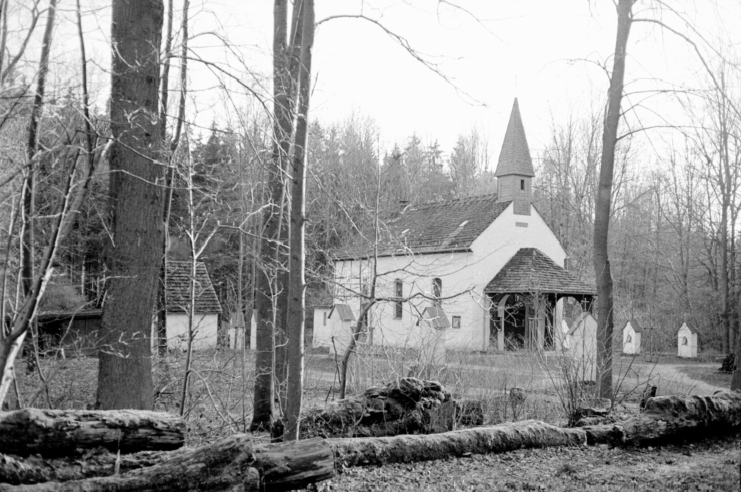 Einsiedelei in der Nähe von Warburg